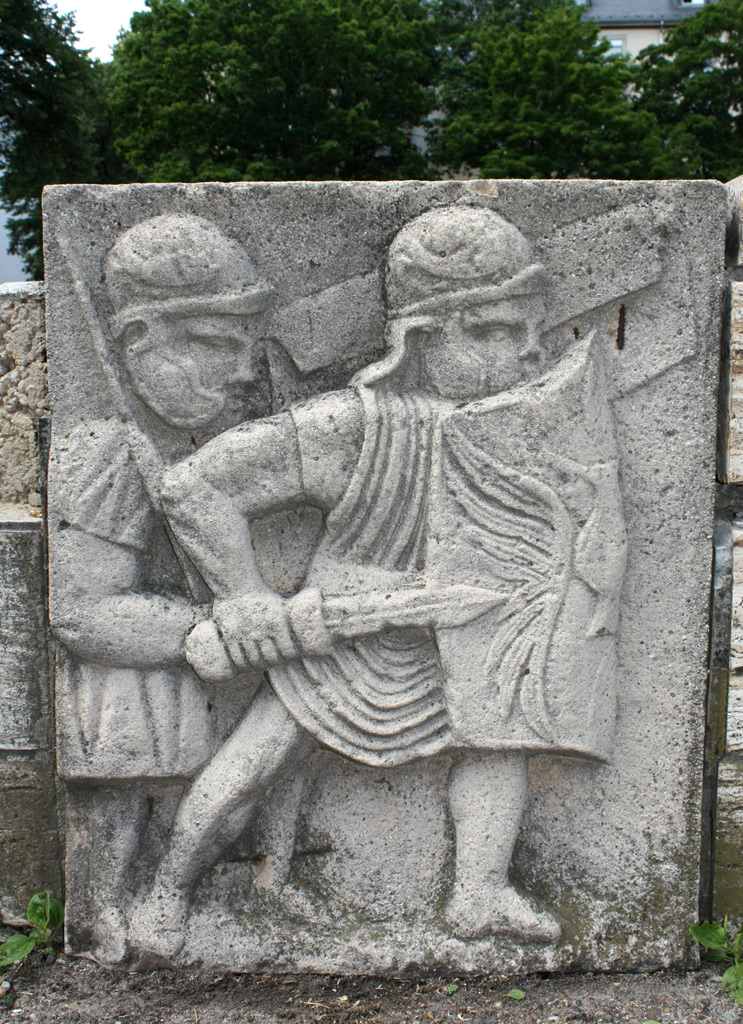 Originalgetreue Nachbildung des Reliefs eines Säulensockels aus dem Bereich des Legionslagers von Mogontiacum. Das Relief zeigt zwei römische Legionäre in Kampfordnung. Der Säulensockel war Teil einer Pfeilerhalle, die möglicherweise zum Praetorium des Lagers gehörte. Er wurde als Spolie beim Bau der zweiten Stadtmauer um 350 und gleichzeitgem Abriss des Lagers verwendet. FO: Mainz, Kästrich. Original aus der 2. Hälfte des 1. Jahrhunderts. Landesmuseum Mainz (Inv.Nr. S 341)